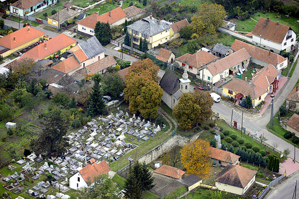 Tarnaszentmária légi fotó